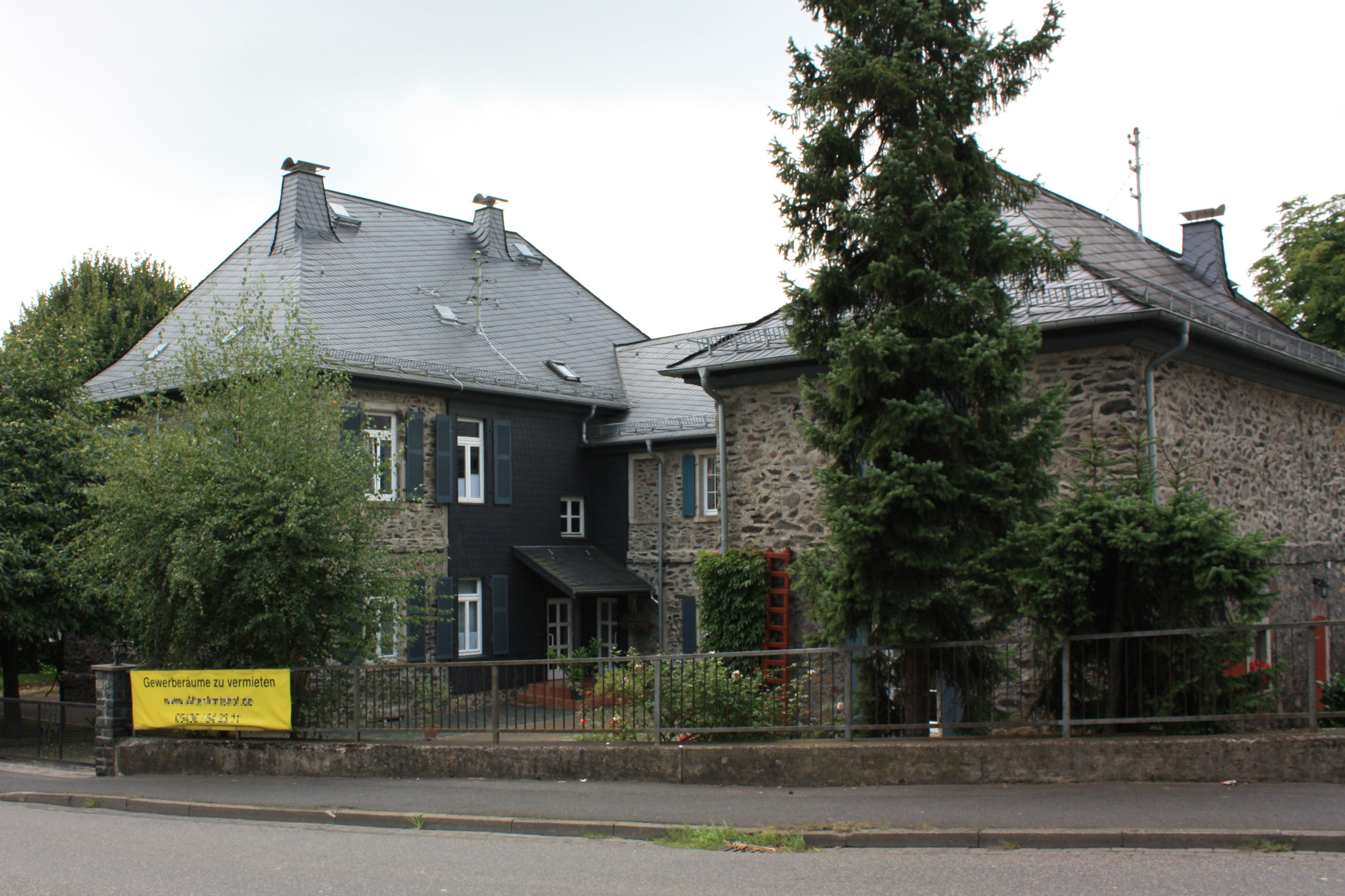 Das 1804 errichtete klassizistische Gebäude für den geplanten Amtshof in Dorchheim, Hessen, Deutschland.